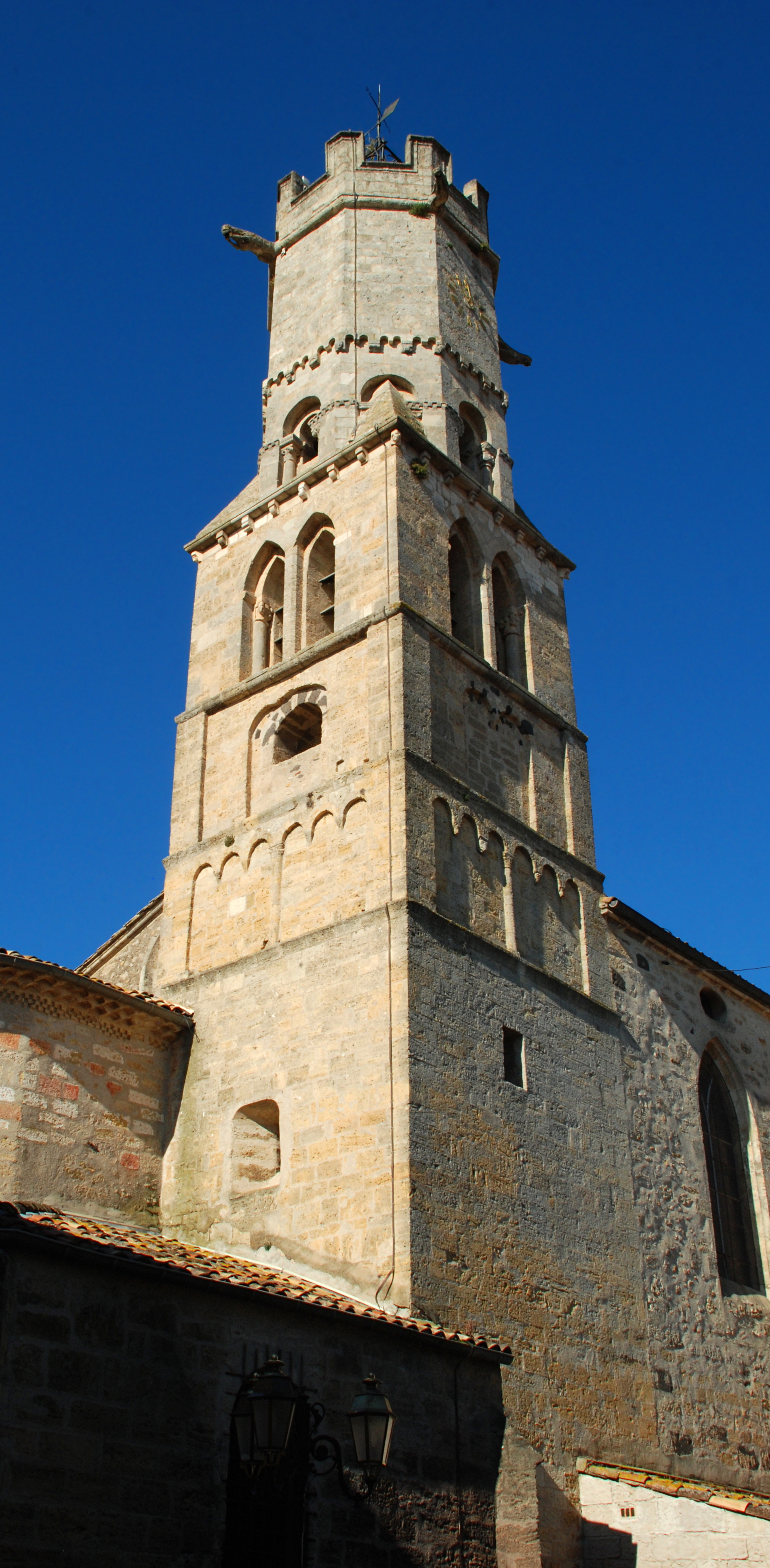 France - Languedoc - Hérault - Villeneuve-lès-Béziers - église de l'Invention-de-Saint-Étienne